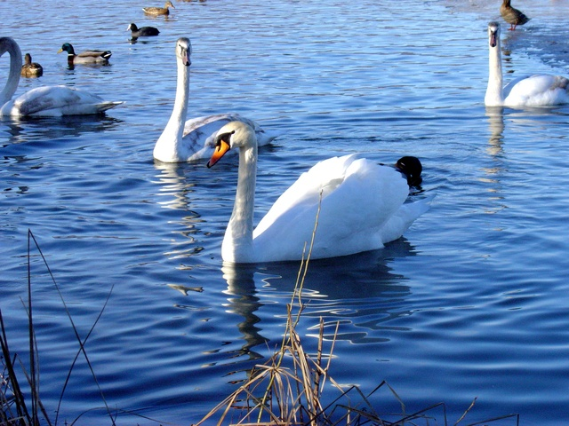 Swan / Cygnes